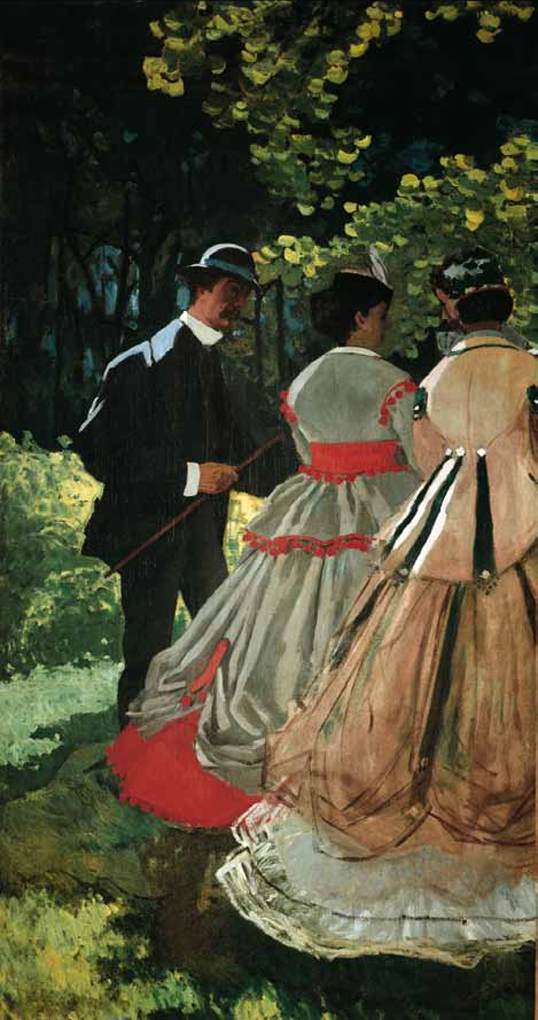 (left panel)